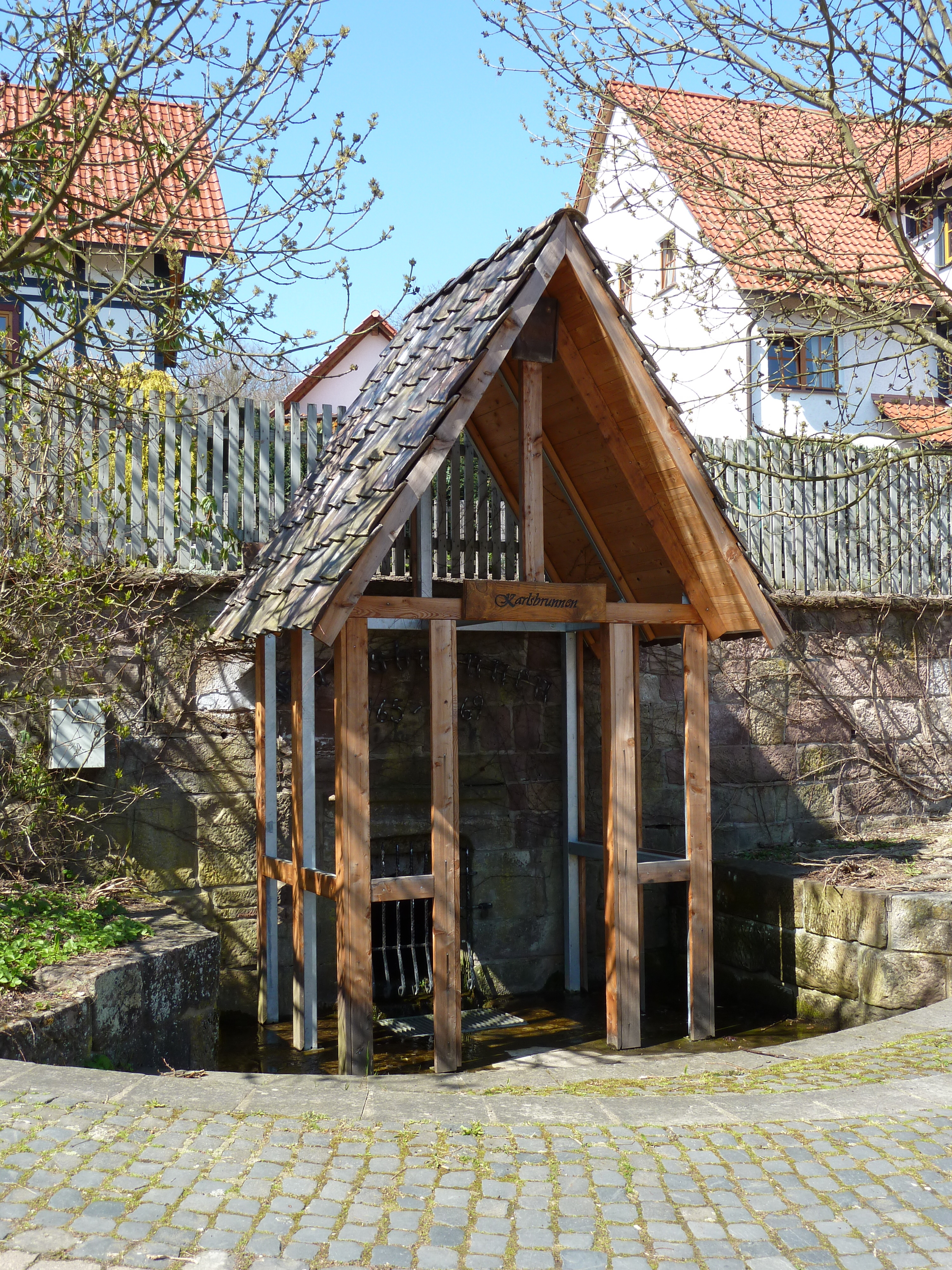 Karlsbrunnen in Eichenberg, Gemeinde Neu-Eichenberg, Nordhessen